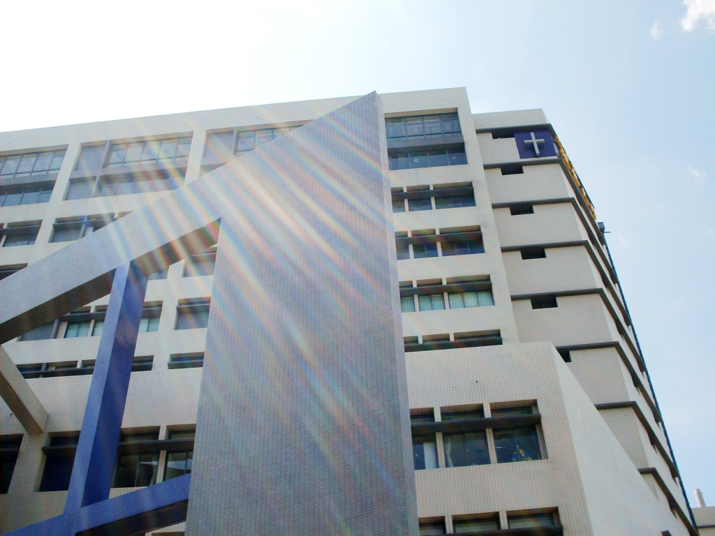 輔大醫學院